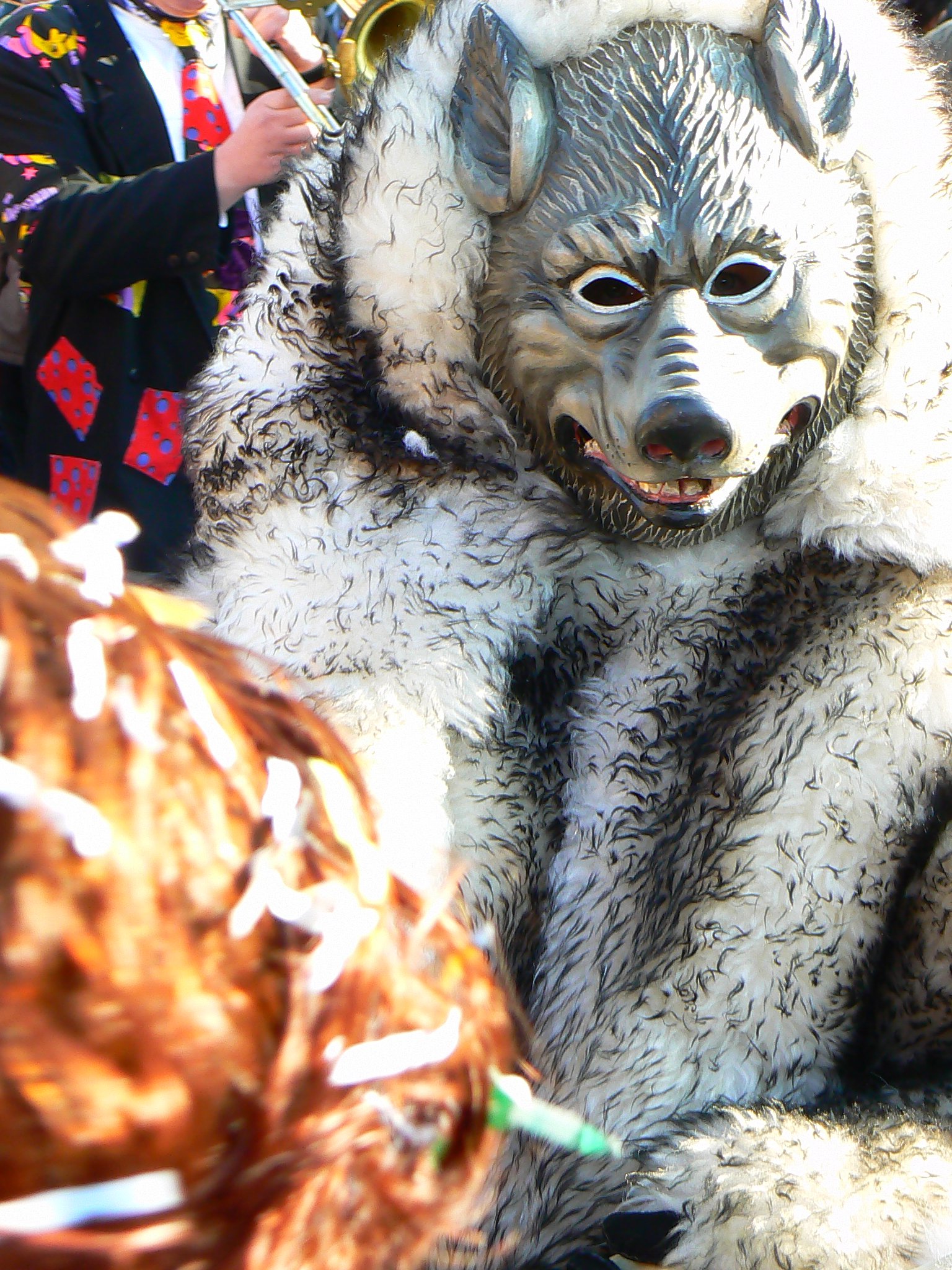 Burgstallwolf der Narrenzunft Wolfenhausen e. V. (fotografiert in Rottenburg am Neckar, 2007)